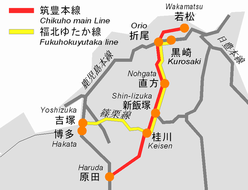 Map of Fukuhokuyutaka Line , Kyushu Japan.